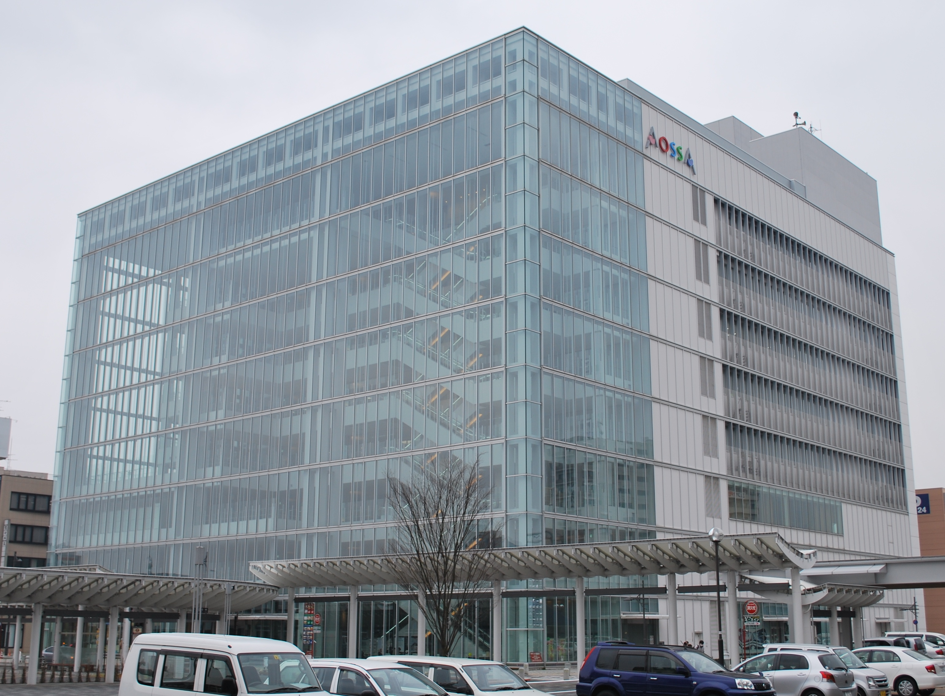 福井県福井市の商業ビル、AOSSA（アオッサ）。作者撮影。